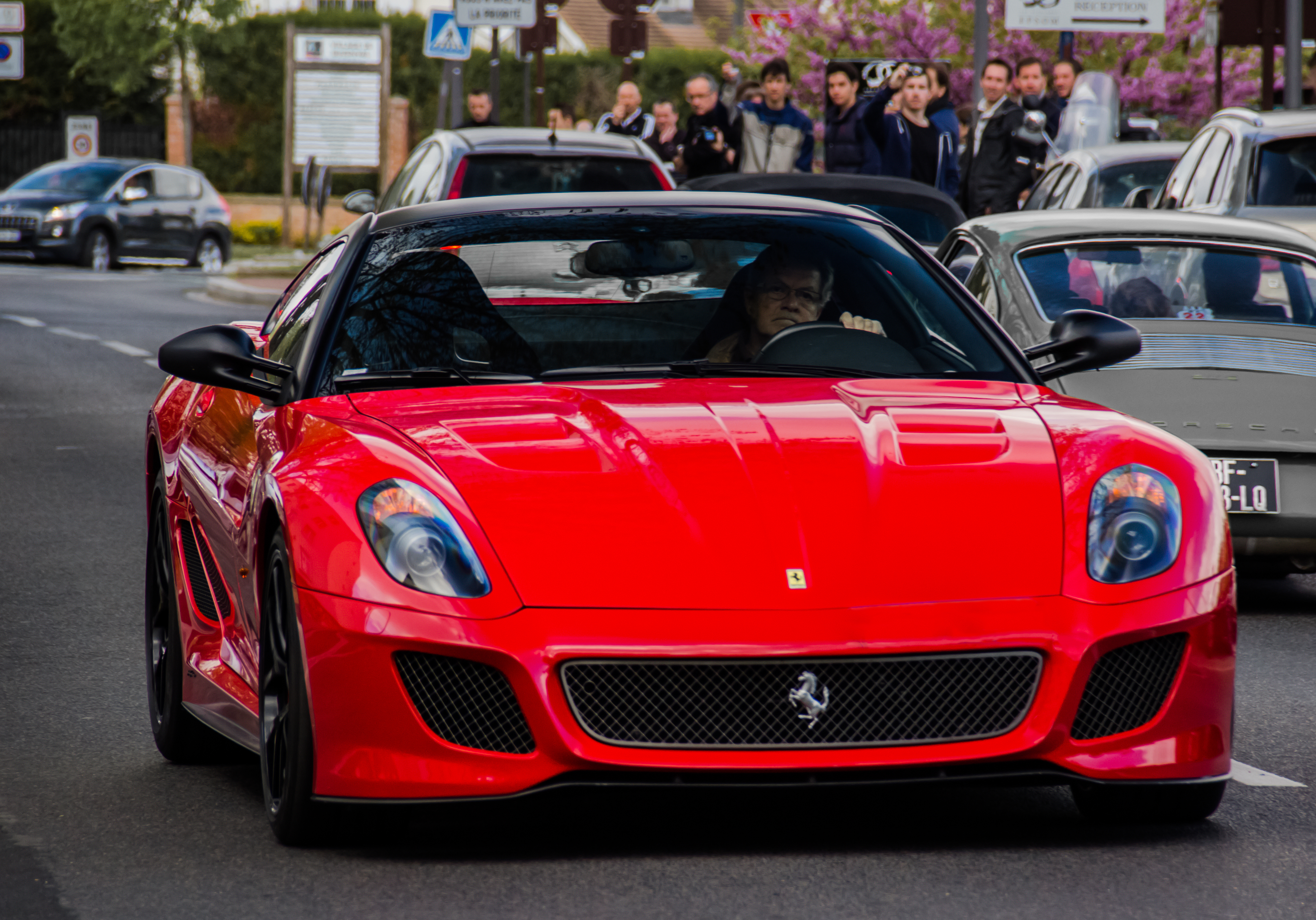 599 GTO